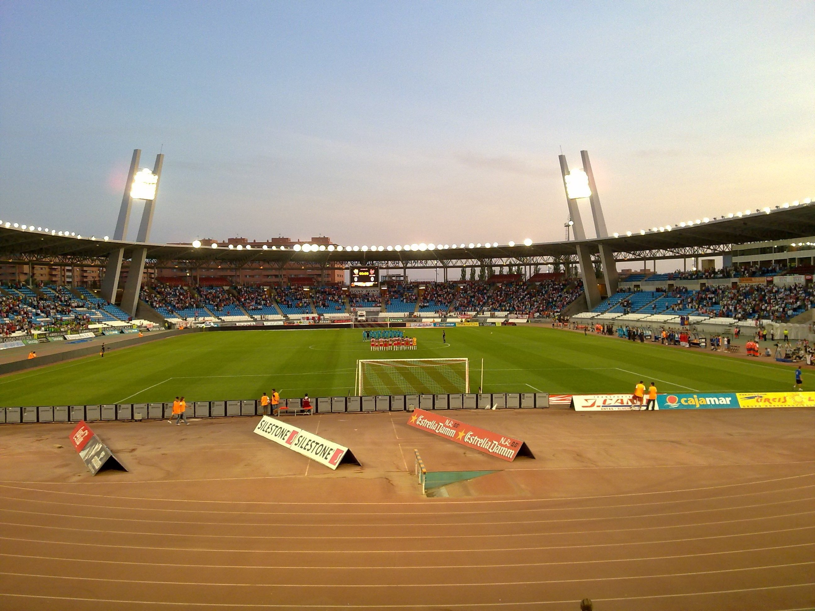 ud almeria